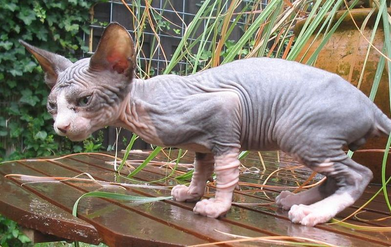 Sphynx kitten, 12 weeks, 2005